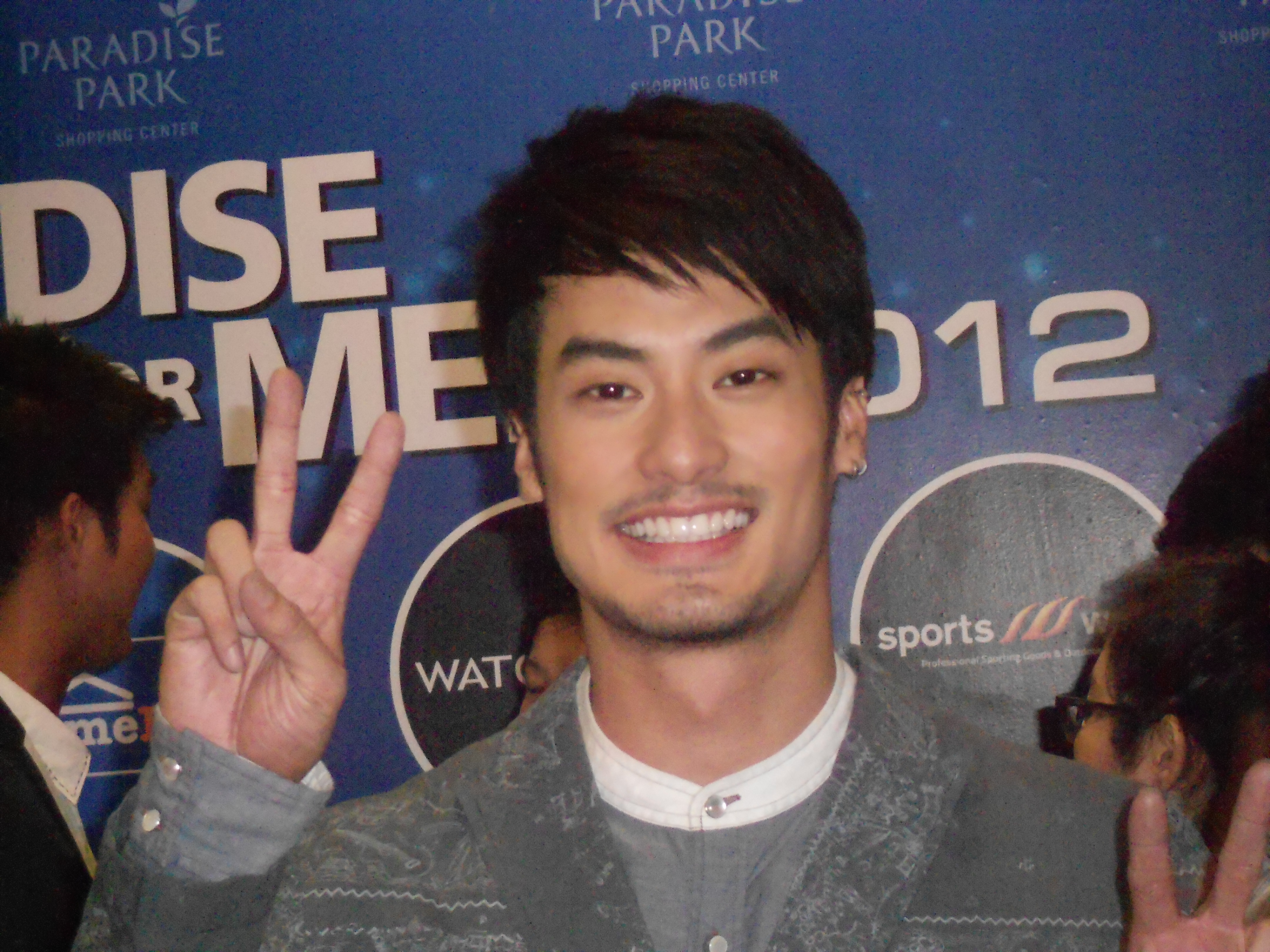 Paradise for Men 2012